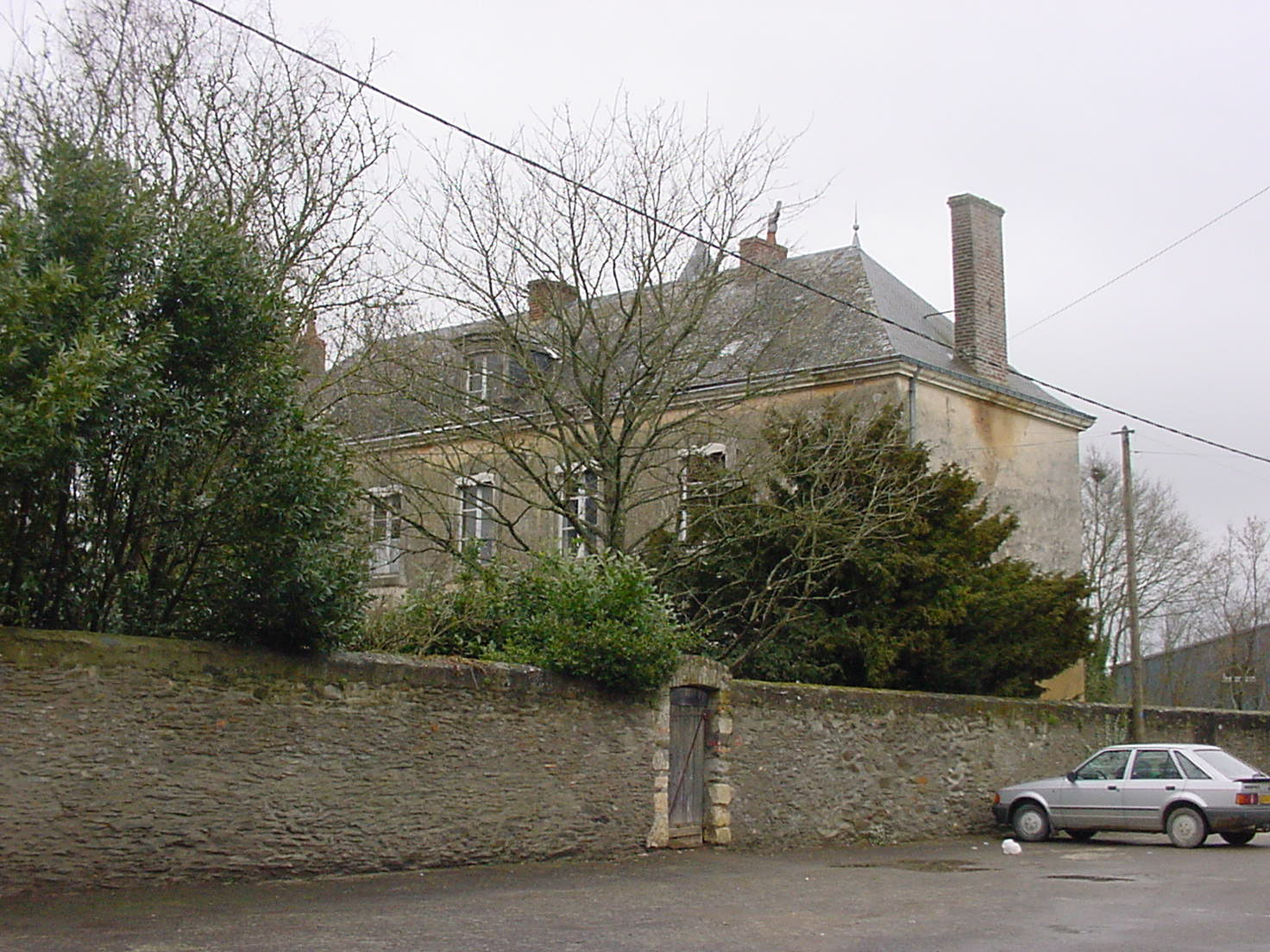 20010304_Maison du prêtre vue de face.JPG